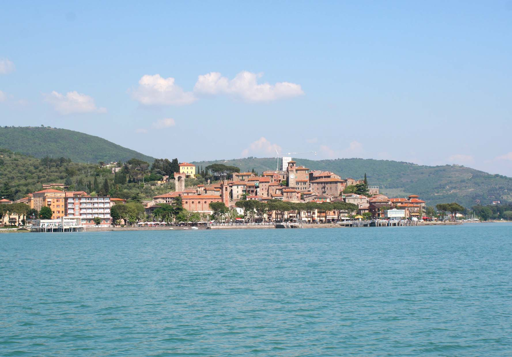 Passignano_Trasimeno